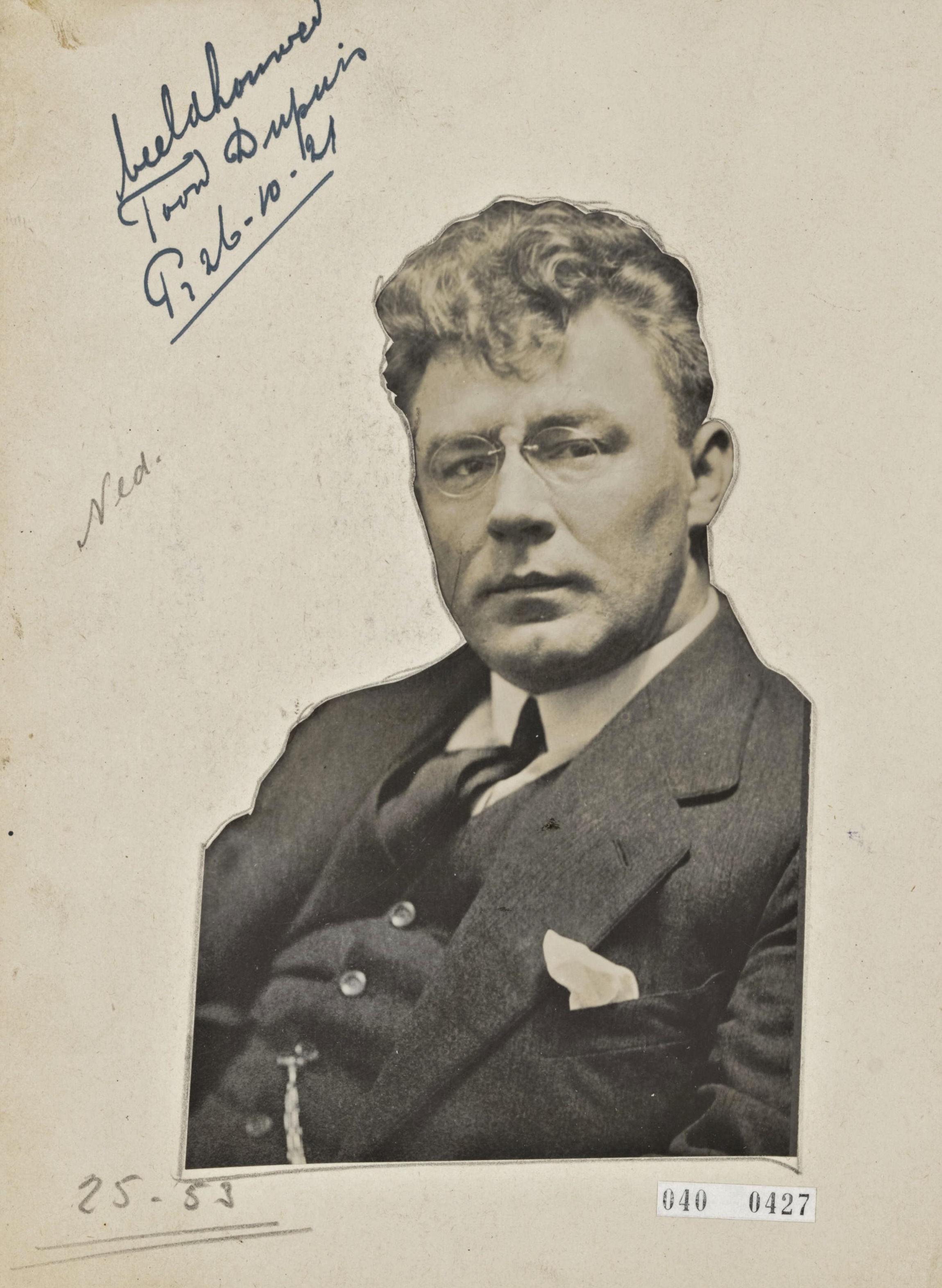 Toon Dupuis, Beeldhouwer, docent aan de Koninklijke Akademie van Beeldende Kunsten te Den Haag